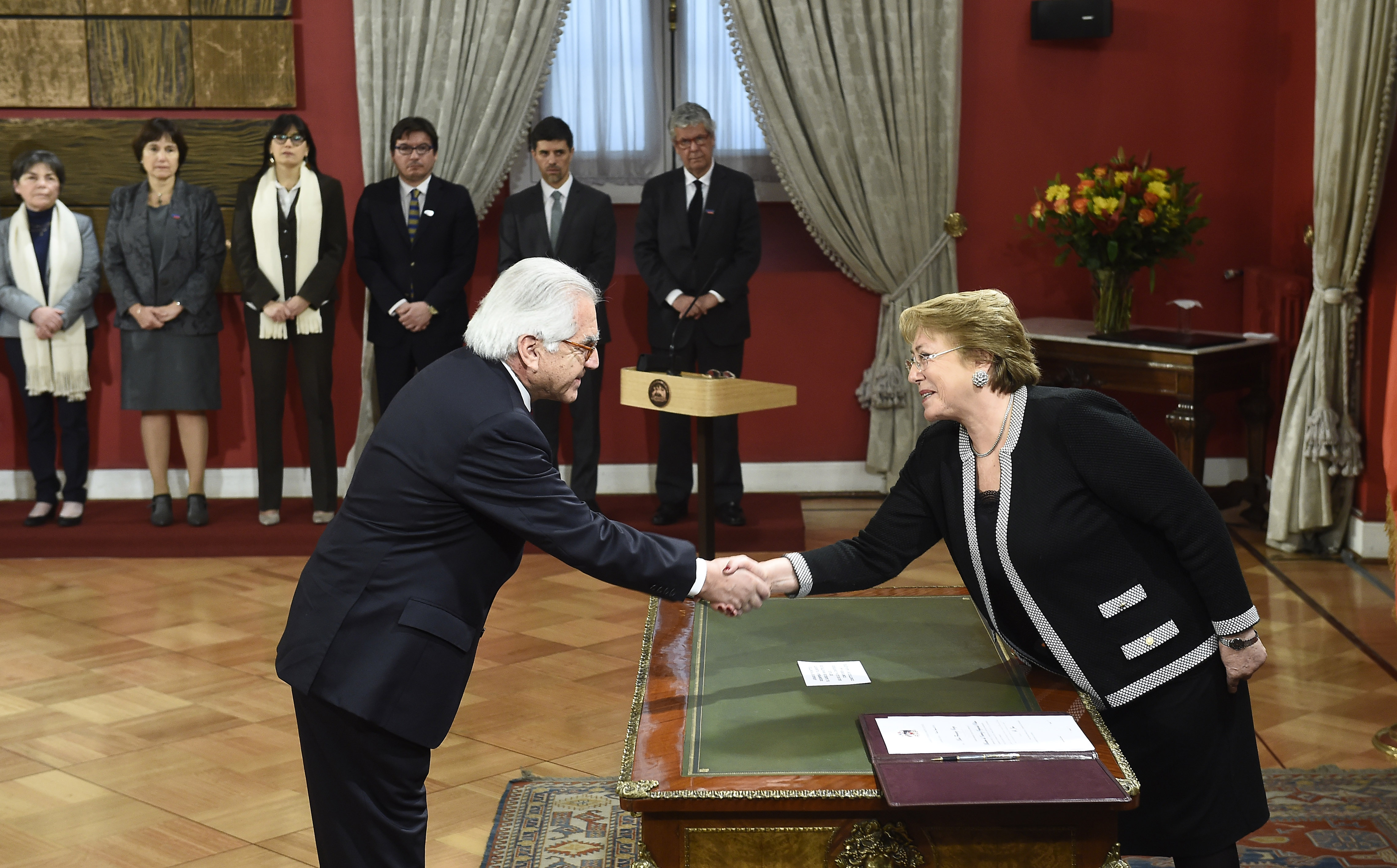 Gobierno de Chile